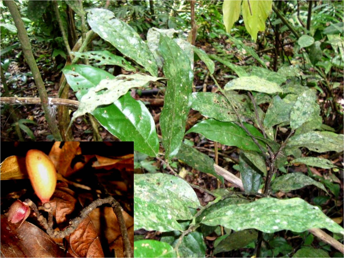 Stenanona flagelliflora México, Veracúz.